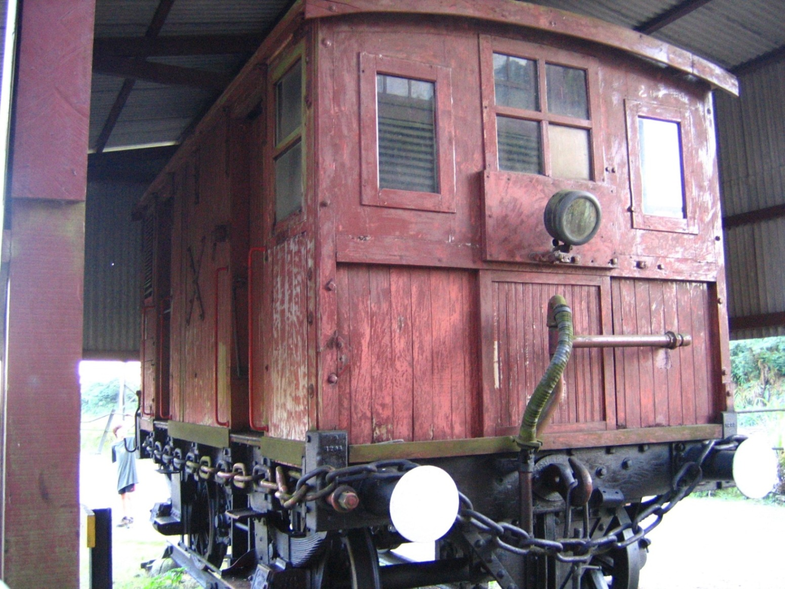 Trem serra-breque